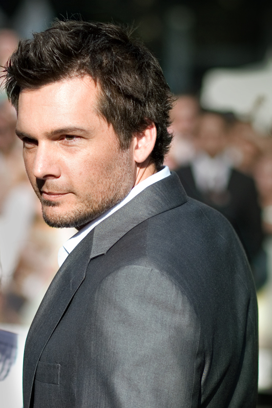 Len Wiseman at the Live Free or Die Hard (Die Hard 4.0) London premiere